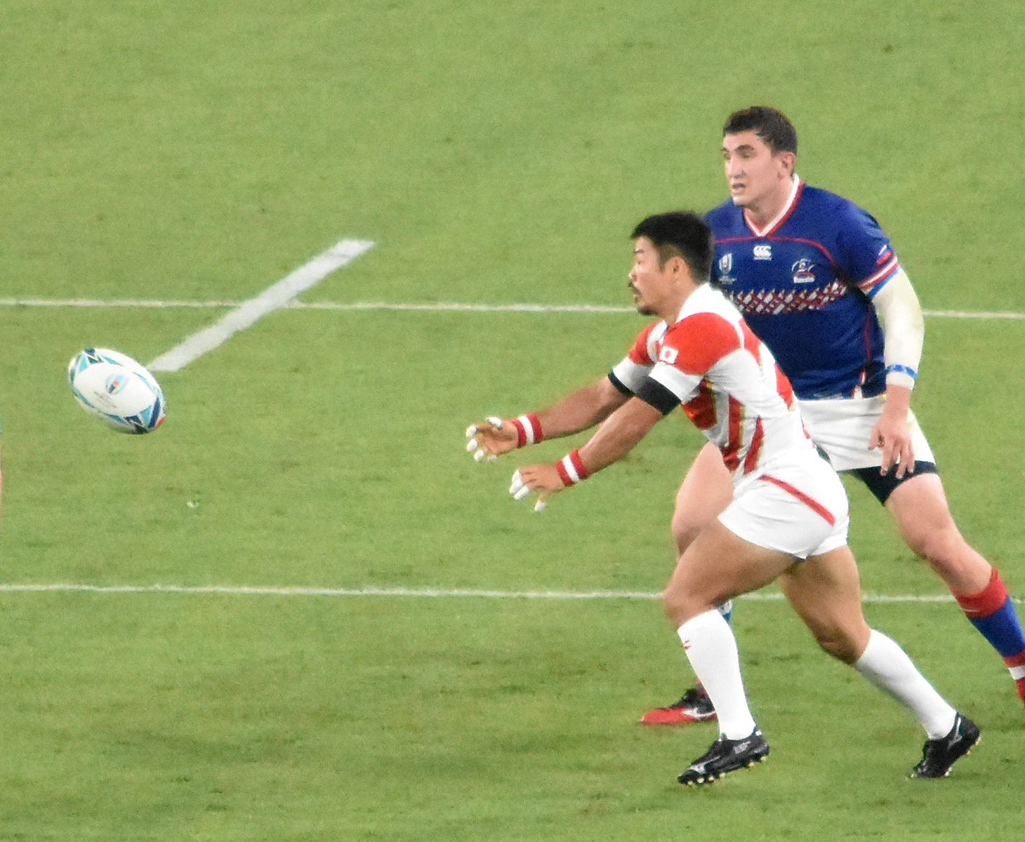 田中 史朗